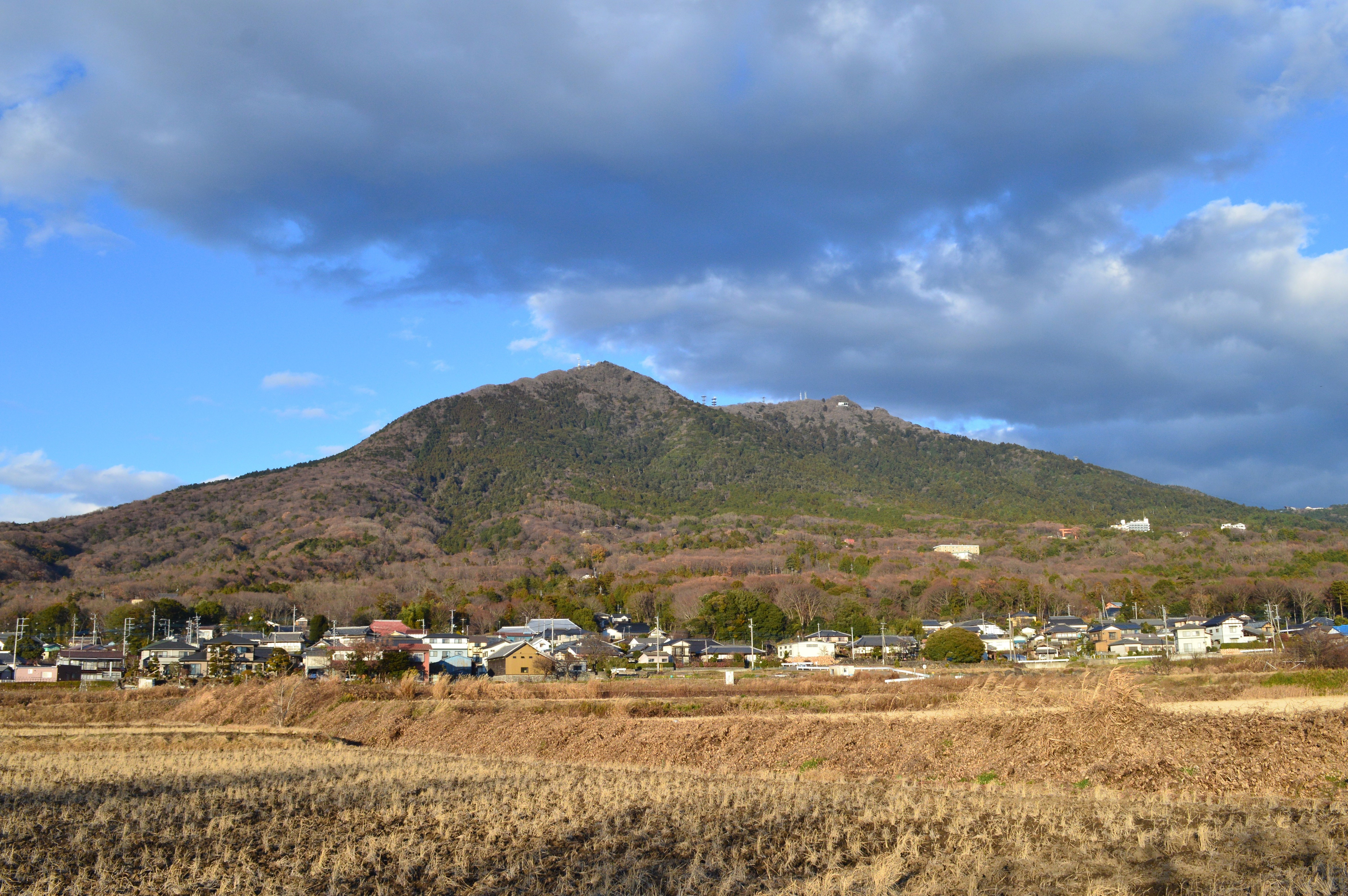 冬の筑波山 (南方より)